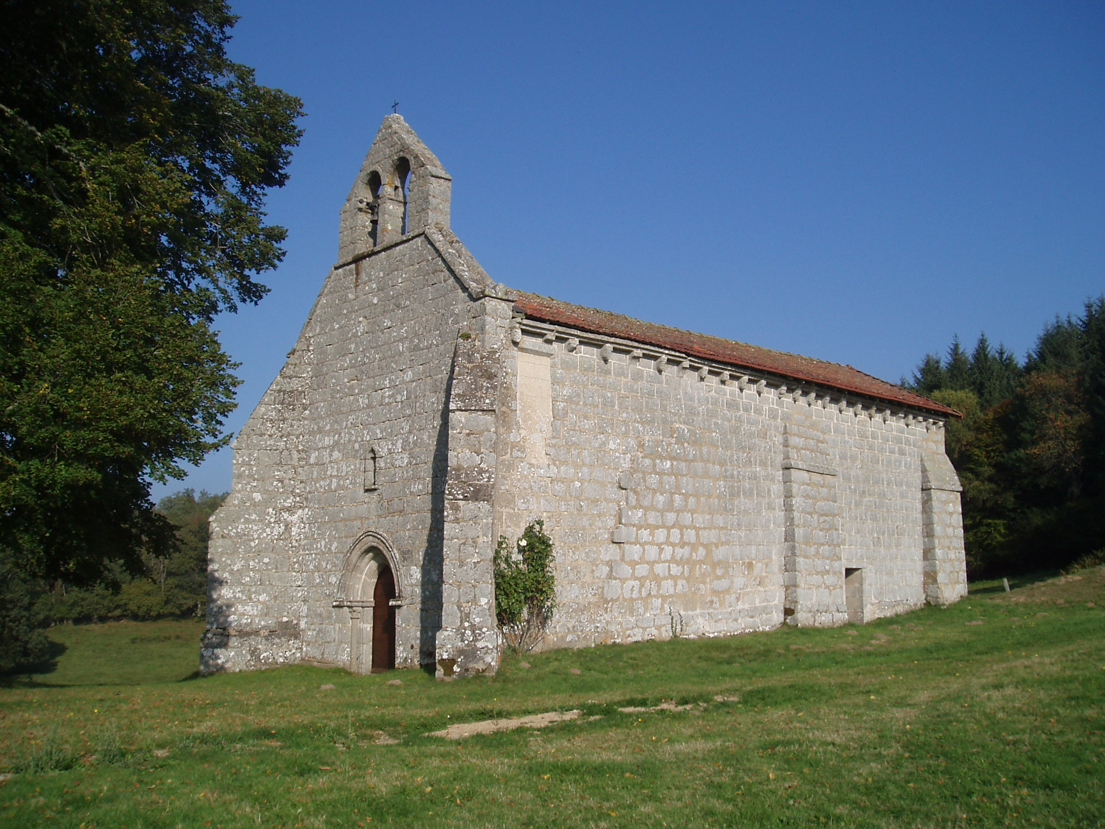 Chapelle